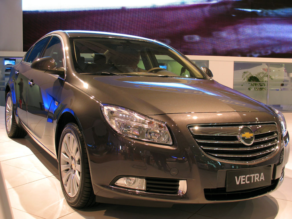 L'appellation Vectra est ambigue en Amérique latine. Elle désigne en effet 3 modèles sur 2 segments différents issu du même constructeur, à savoir: l'Opel Insignia comme on le voit ici, celle qui l'a précédée mais aussi sur certains marchés, l'Astra H européenne !